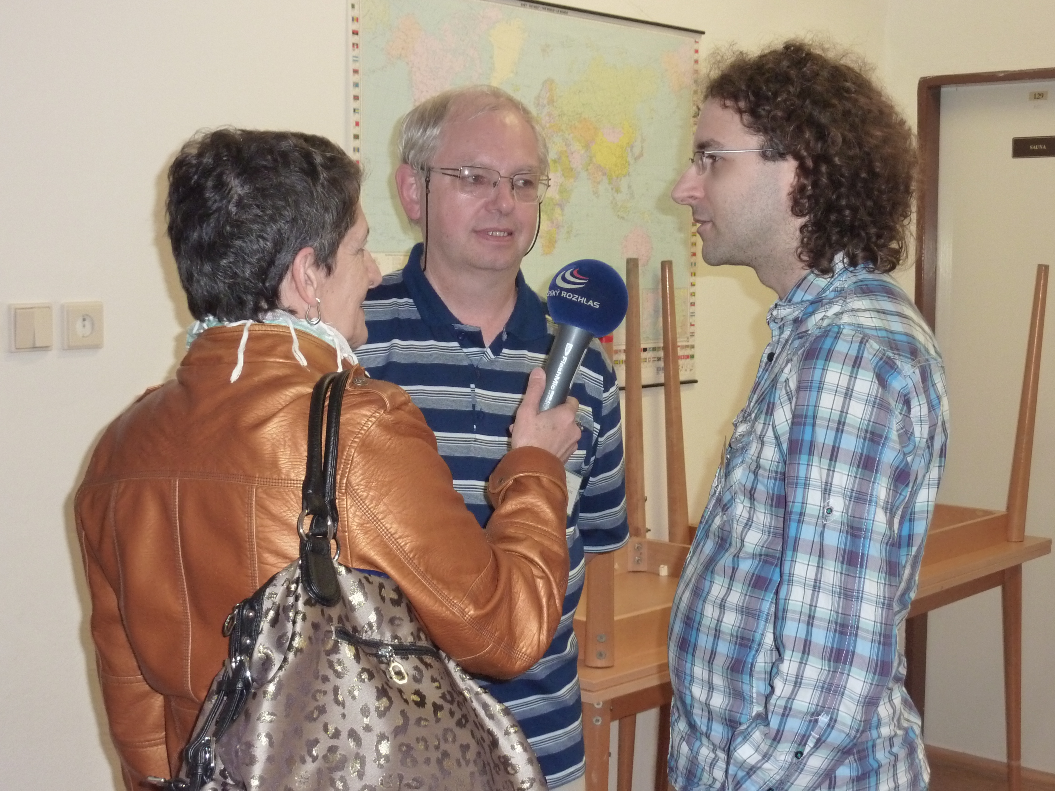 Intervjuo de Chuck Smith kaj Miroslav Malovec por la Ĉeĥa radio dum Esperanta Vikimanio 2011 en Svitavy.